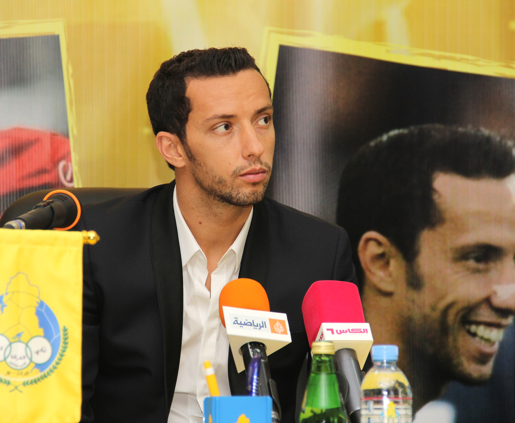 Le footballeur brésilien Luis Nene durant sa présentation à Doha